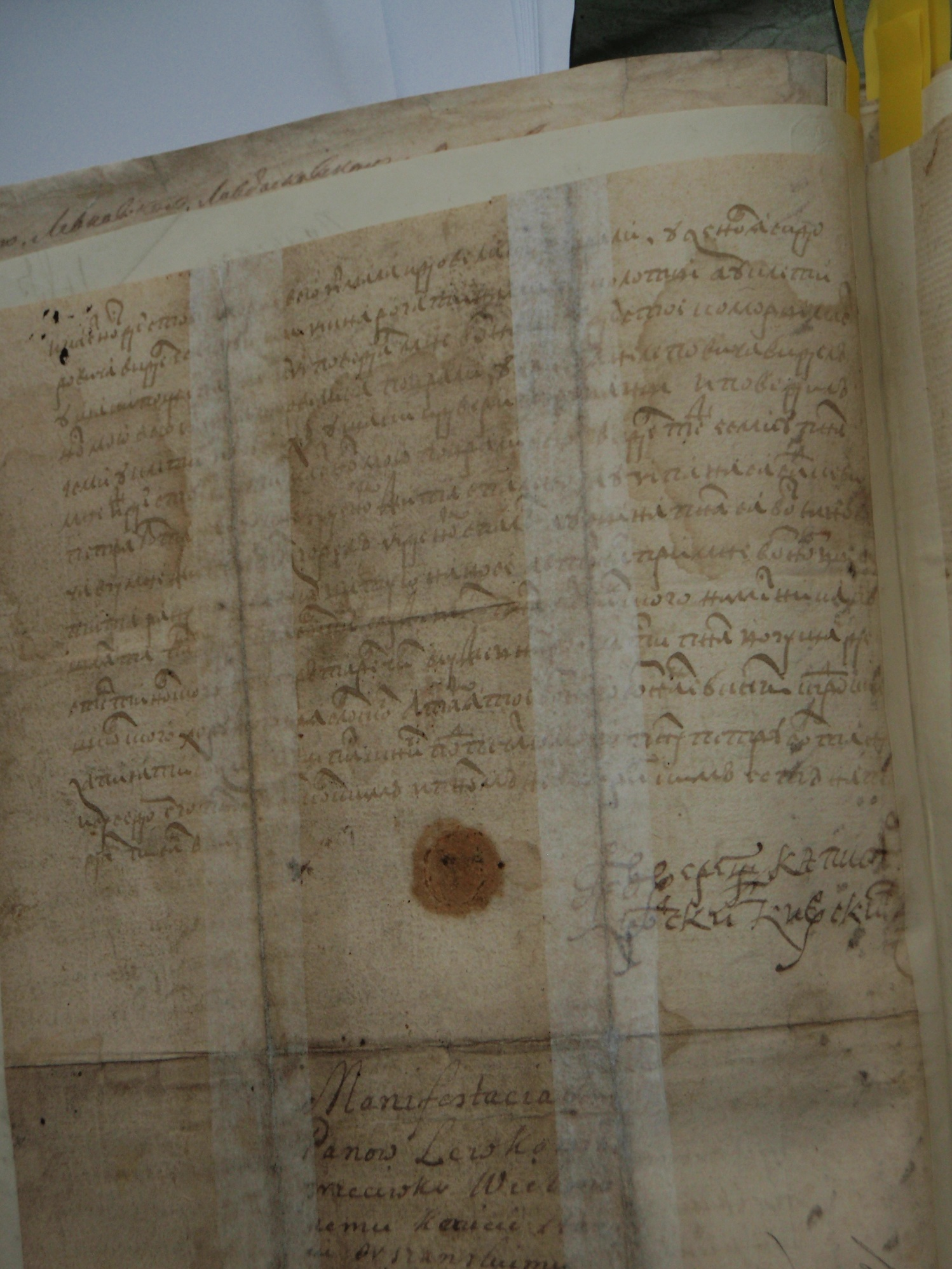 Выпис с книг кгродских замку господарского Киевского от 04. 07. 1576. Лист 2 (оригинал). ГАЖО Дело Левковских.